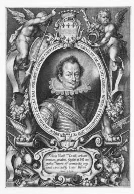 Wenzel Graf von Wrbna (= Würben) und Freudenthal(um 1590 - 1649), Statthalter